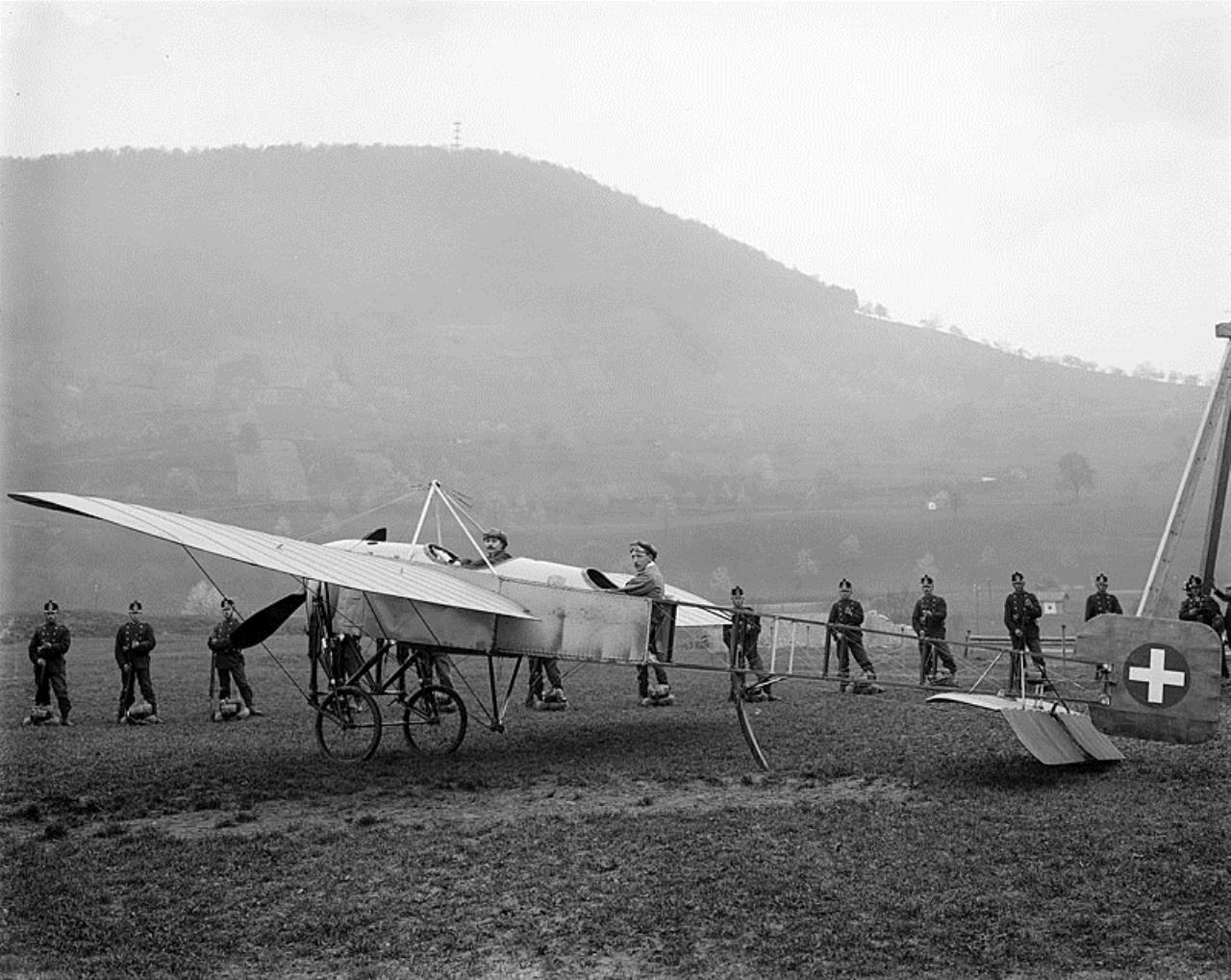 Der Aeroplan "Langenbruck" auf dem Flugfelde "Gitterli" nach seiner Ankunft von Bern. Der Flugpionier Oskar Bider (1891-1919) aus Langenbruck mit seinem Mechaniker Jean-Blaise Saniez (1889-1976) nach der Landung am 25. April 1913 auf dem Gitterli in Liestal. Zwei Tage danach fand der Liestaler Flugtag statt. Hinter der Maschine sperrt das Militär nicht die Landebahn vor unvorsichtigen Zuschauern ab, sondern Oskar Bider war mitten in einer exerzierenden Truppe gelandet. Das Flugzeug ist ein Eindecker von Louis Blériot mit einem Motor von 80 PS, der Anfang April 1913 eingebaut worden war. Bider hat am 13. Juli 1913 als Erster eine Alpenüberquerung geschafft - von Bern nach Mailand über das Jungfraujoch, zugleich mit 3600 m Schweizer Höhenrekord. Das Flugzeug ist ein Eindecker von Louis Blériot mit einem Motor von 80 PS, der Anfang April 1913 eingebaut worden war.